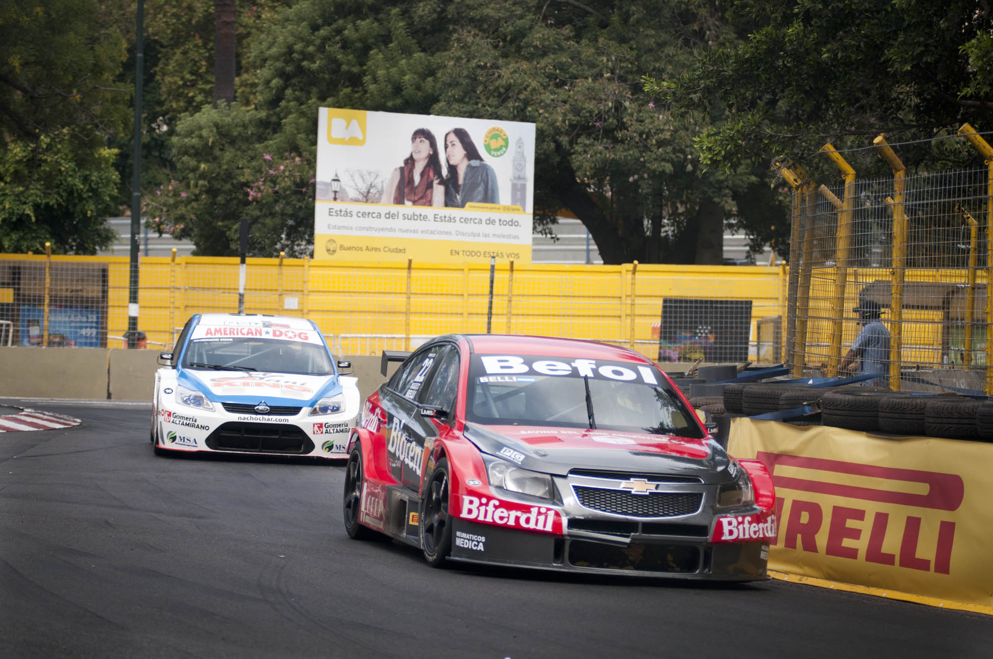 Buenos Aires. Domingo 31 de Marzo de 2013. Los vecinos disfrutaron del "Circuito callejero Ciudad de Buenos Aires, TC2000" en el barrio de Recoleta. Foto: Tony Valdéz/GCBA